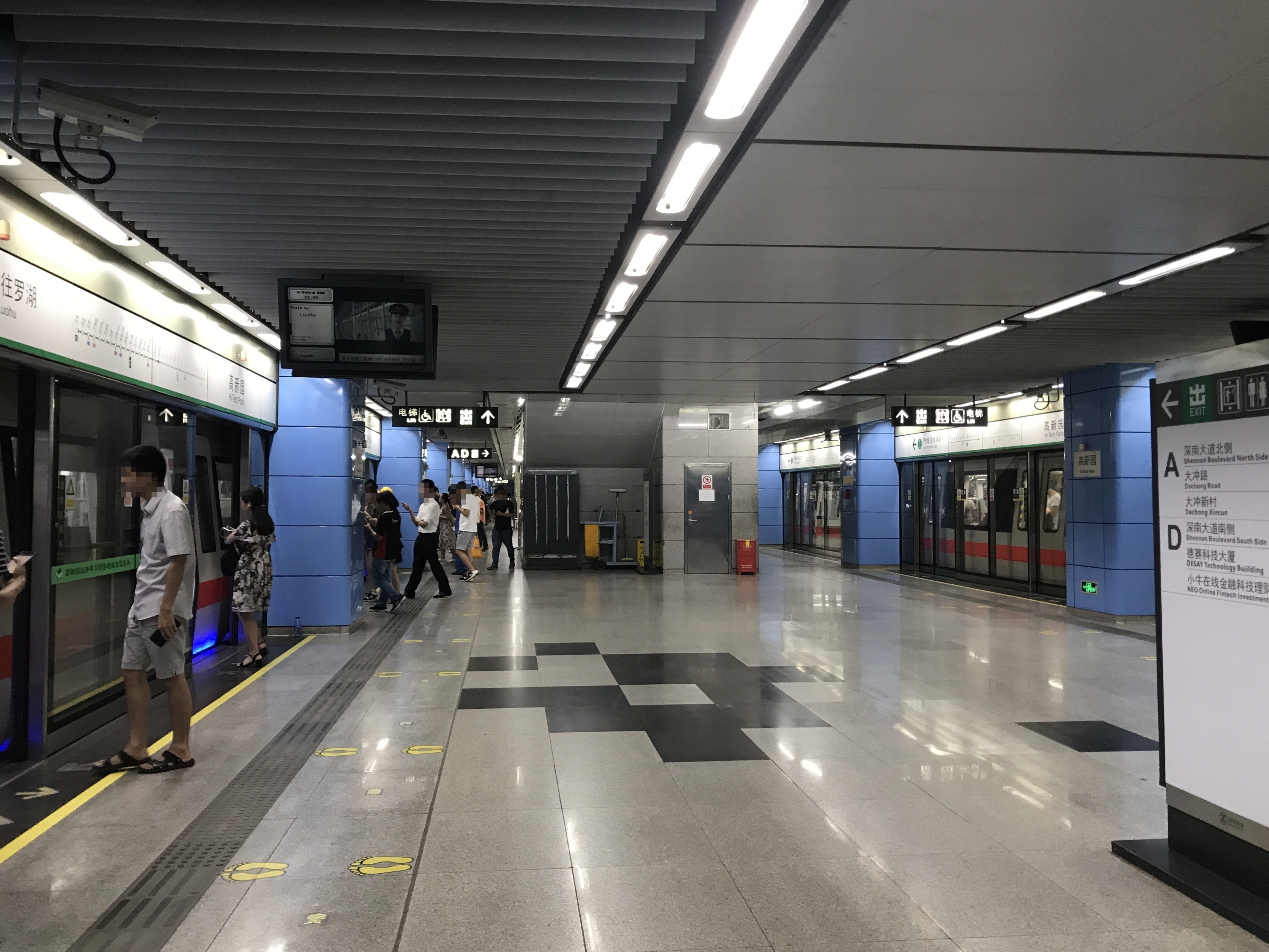 高新園駅のホーム